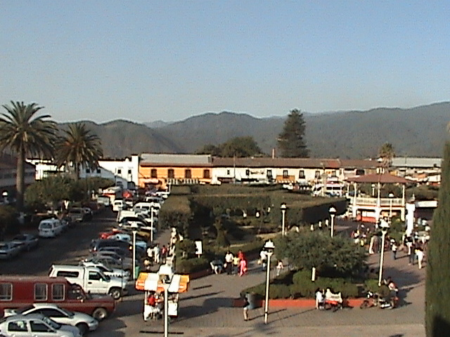 El centro de Amecameca